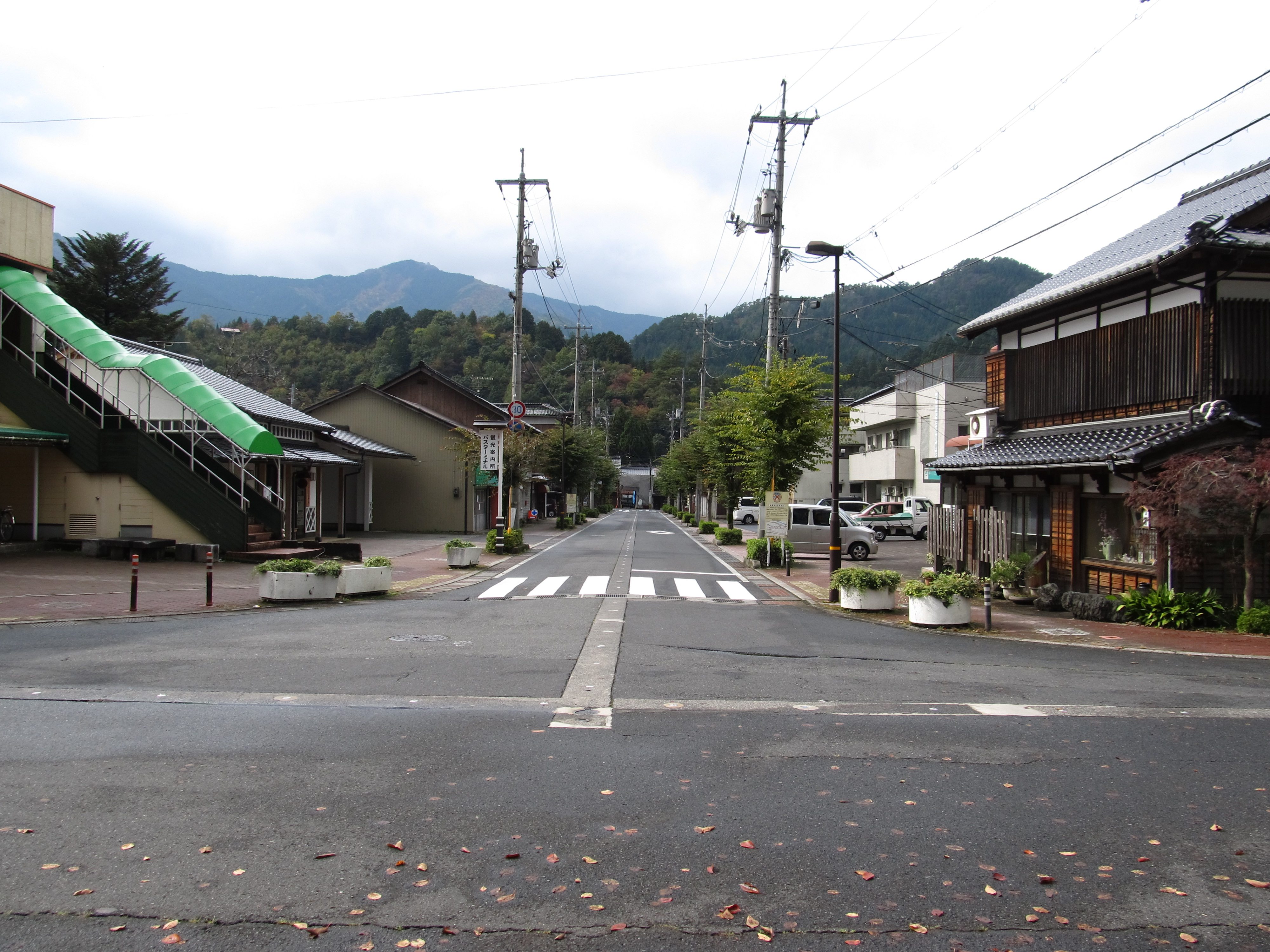 鳥取県道176号若桜停車場線（若桜駅前から撮影）。